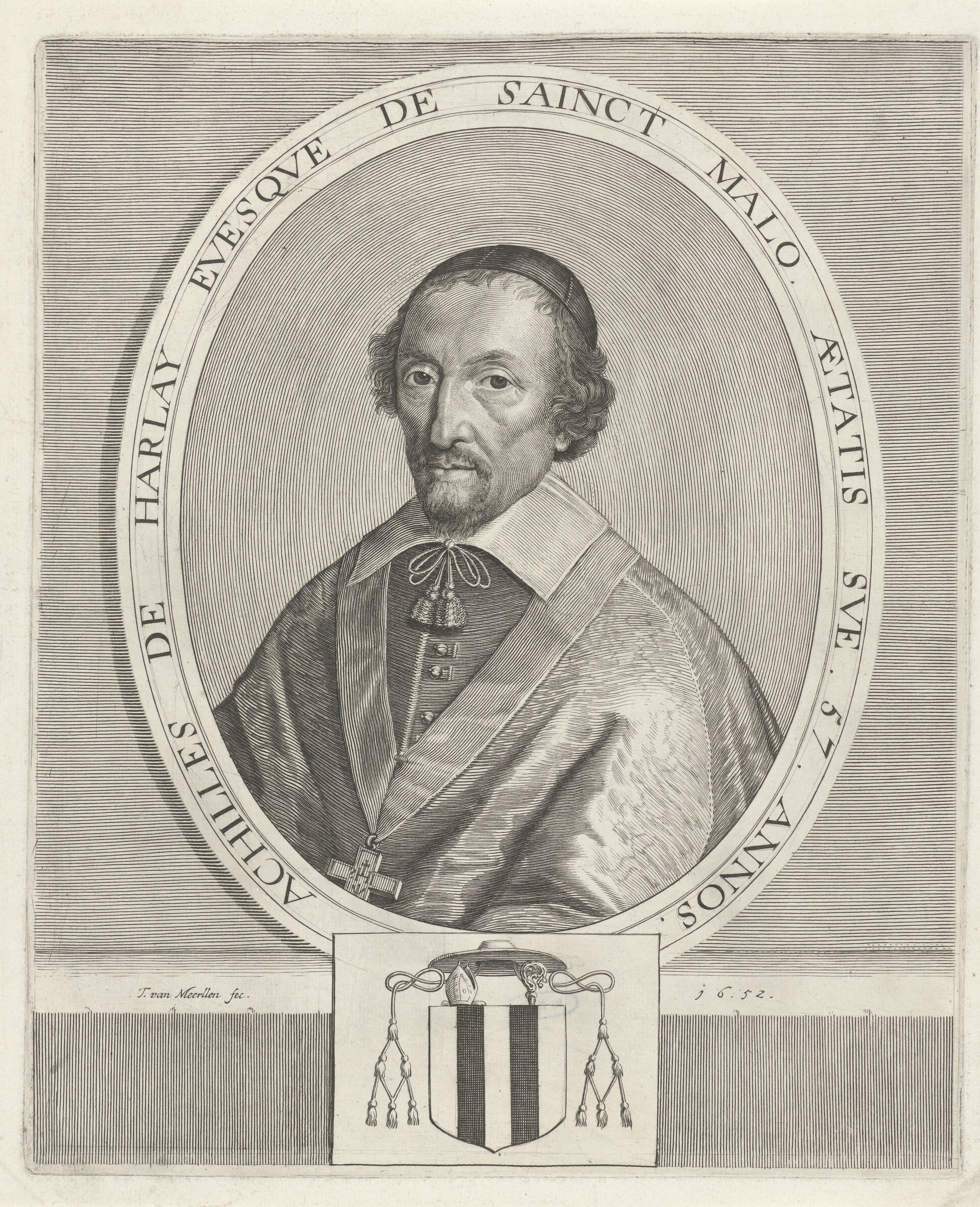 IdentificatieTitel(s): Portret van Achille de Harlay de SancyObjecttype: prent Objectnummer: RP-P-1893-A-17865Catalogusreferentie: Hollstein Dutch 29Opschriften / Merken: verzamelaarsmerk, verso, gestempeld: Lugt 2228Omschrijving: Portret van Achille de Harlay de Sancy, bisschop van Saint-Malo, op 57-jarige leeftijd. Midden onder zijn wapenschild.VervaardigingVervaardiger: prentmaker: Theodor van Merlen (II) (vermeld op object)Plaats vervaardiging: AntwerpenDatering: 1652Fysieke kenmerken: gravure en etsMateriaal: papier Techniek: graveren (drukprocedé) / etsenAfmetingen: plaatrand: h 302 mm × b 249 mmOnderwerpWie: Achille de Harlay de SancyVerwerving en rechtenVerwerving: aankoop mar-1893Copyright: Publiek domein